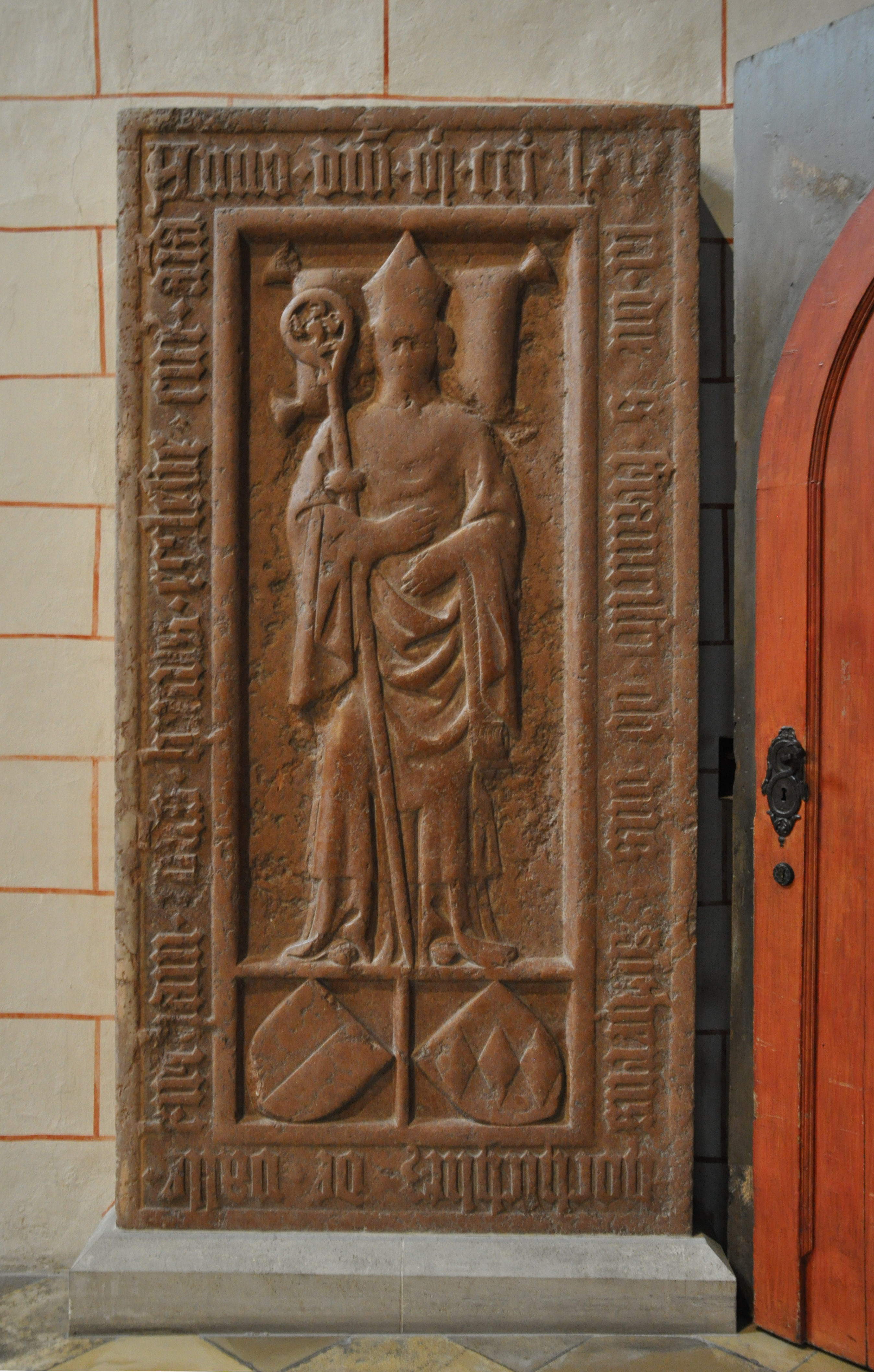 Augsburg, Dom, Grabplatte für Bischof Walter von Hochschlitz († 1369), mit Wappen des Hochstifts Augsburg und Wappen Hochschlitz